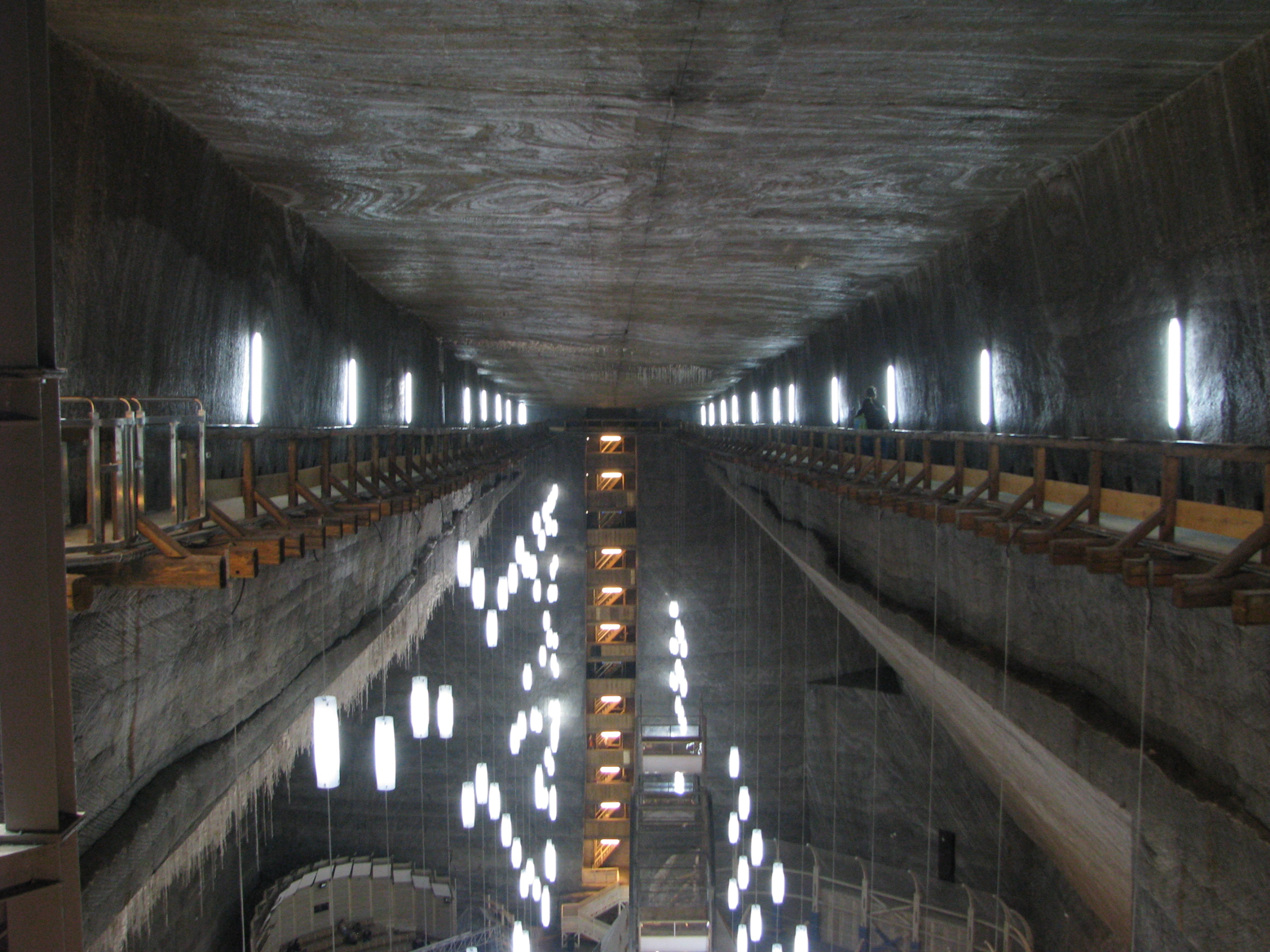 Salina Turda - mina Rudolf (vedere de pe balcon).